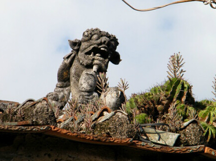 中文（中国大陆）: 广东省汕头市达濠老厝厝顶的风狮